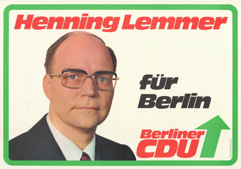 Henning Lemmer für Berlin Berliner CDU Kommentar: Rückseitig mit rotem Filzstift beschriftet. Plakatart: Kandidaten-/Personenplakat mit Porträt Künstler_Grafiker: Christiane Czermak (Fotografin ?) Objekt-Signatur: 10-004 : 502 Bestand: Plakate zu Abgeordnetenhauswahlen Berlin (10-004) GliederungBestand10-18: Plakate zu Abgeordnetenhauswahlen Berlin (10-004) » CDU Lizenz: KAS/ACDP 10-004 : 502 CC-BY-SA 3.0 DE